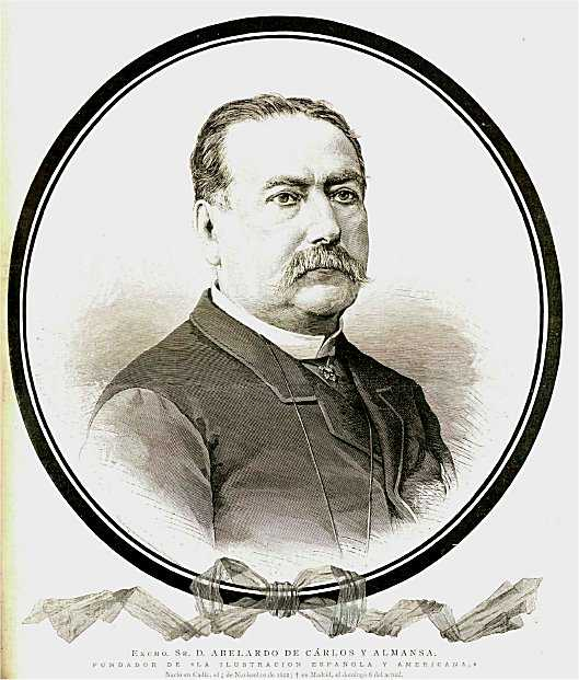 ritratto di Abelardo de Carlos proprietario e fondatore nel 1870 della rivista illustrata "La Ilustración Española y Americana"